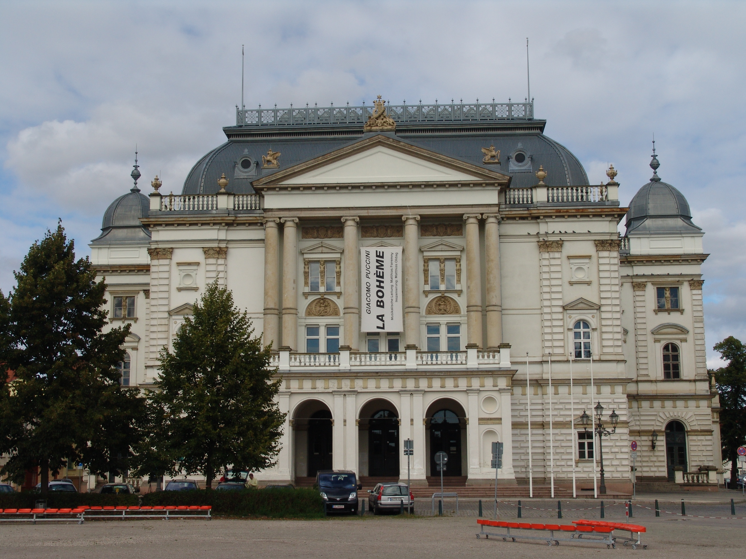 Germany, Schwerin: Mecklenburgisches Staatstheater Schwerin, September 2005, own work